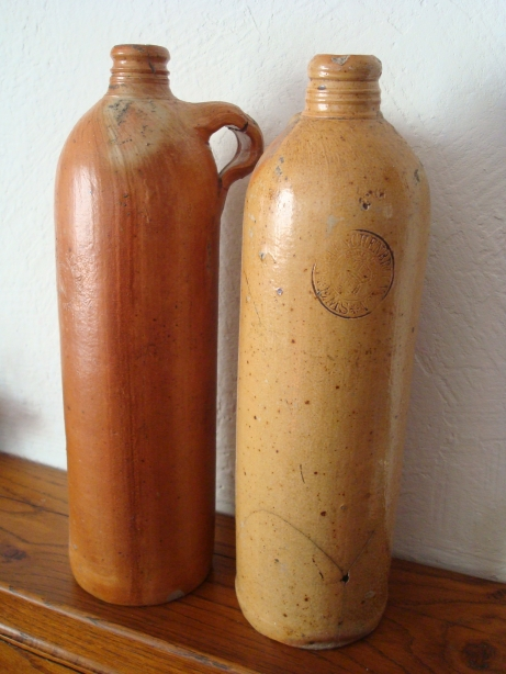 Bouillotte en forme de bouteille en grés